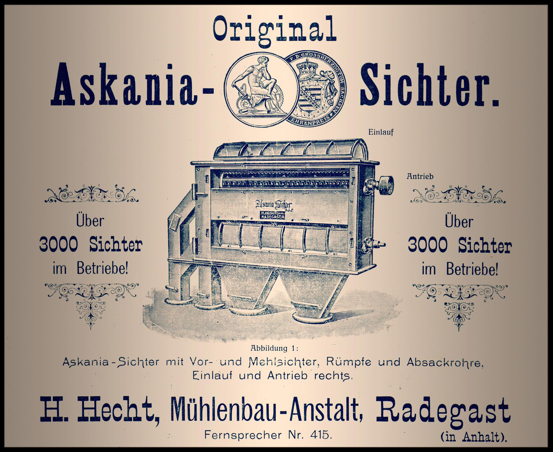 Werbeblatt, Avis vermutlich aus der Zeit um 1900 für den auf einer Ausstellung im Großherzogtum Sachsen mit einem Ehrenpreis ausgezeichneten „Original Askania-Sichter“ von dem zum Zeitpunkt der Bewerbung mehr als 3000 Exemplare gefertigt und in Betrieb gewesen sein sollen. Die Abbildung 1 zeigt den „Askania-Sichter mit Vor- und Mehlsichter, Rümpfe und Absackrohre, Einlauf und Antrieb rechts.“ Hersteller war die „H. Hecht, Mühlenbau-Anstalt, Radegast (in Anhalt)“